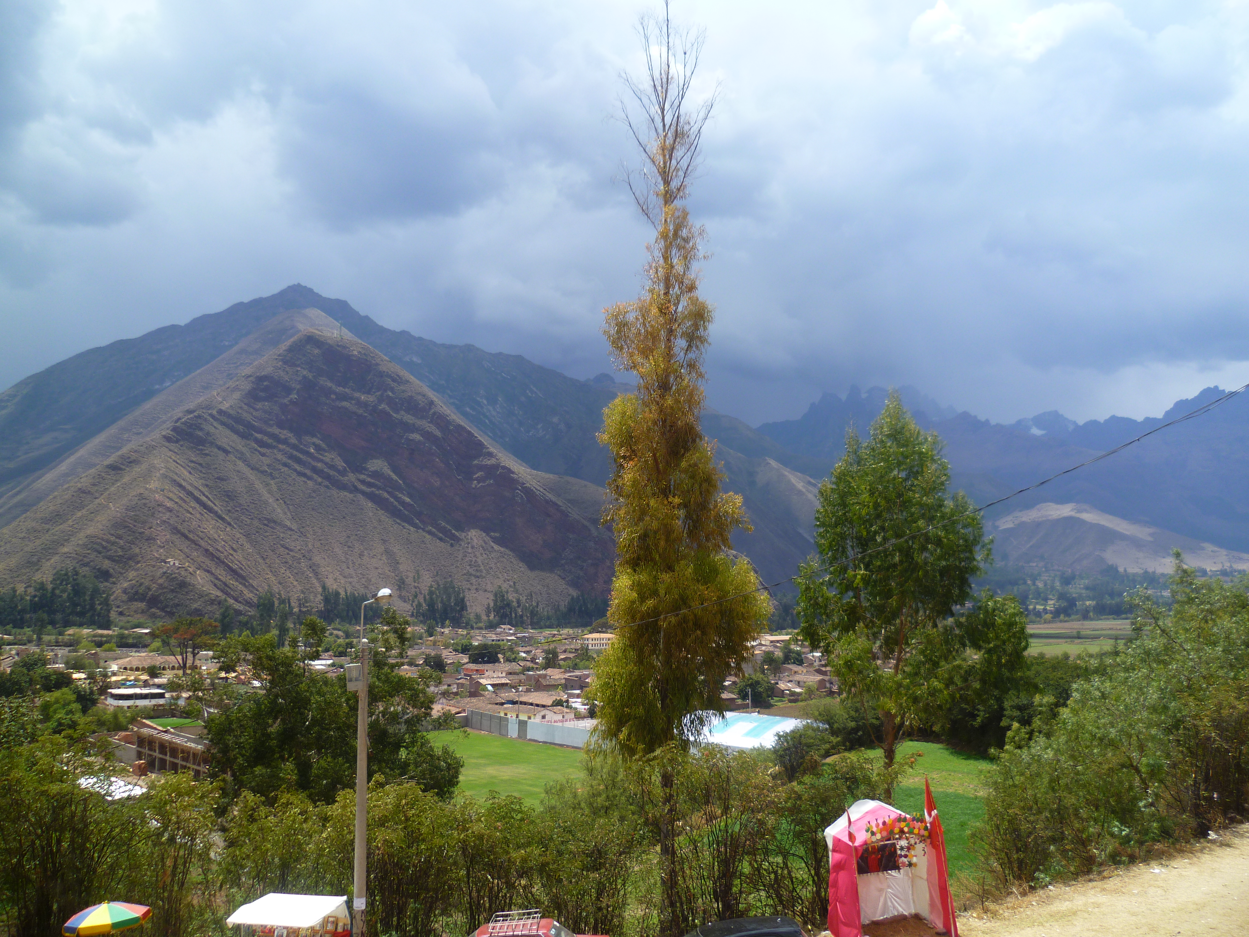 Distrito de Huayllabamba "Capital Mundial del Maiz Blanco"